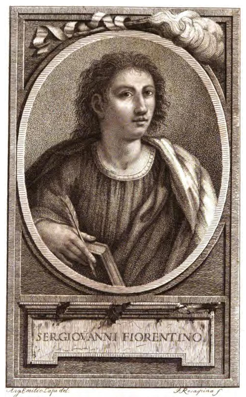 Ser Giovanni Fiorentino (incisione).